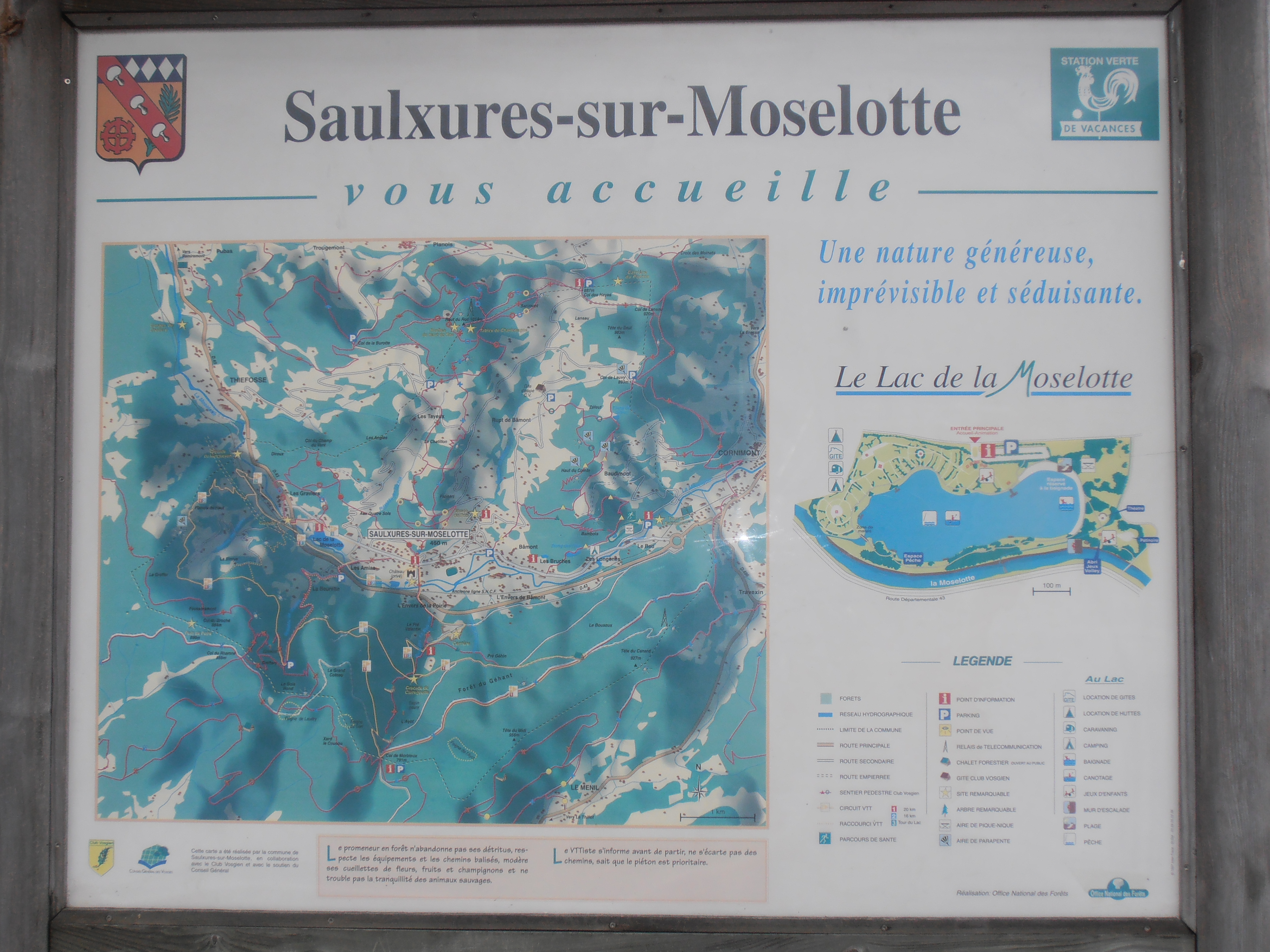 Vosges, Saulxures-sur-Moselotte, Lac de la Moselotte, plan de situation et présentation du plan d'eau